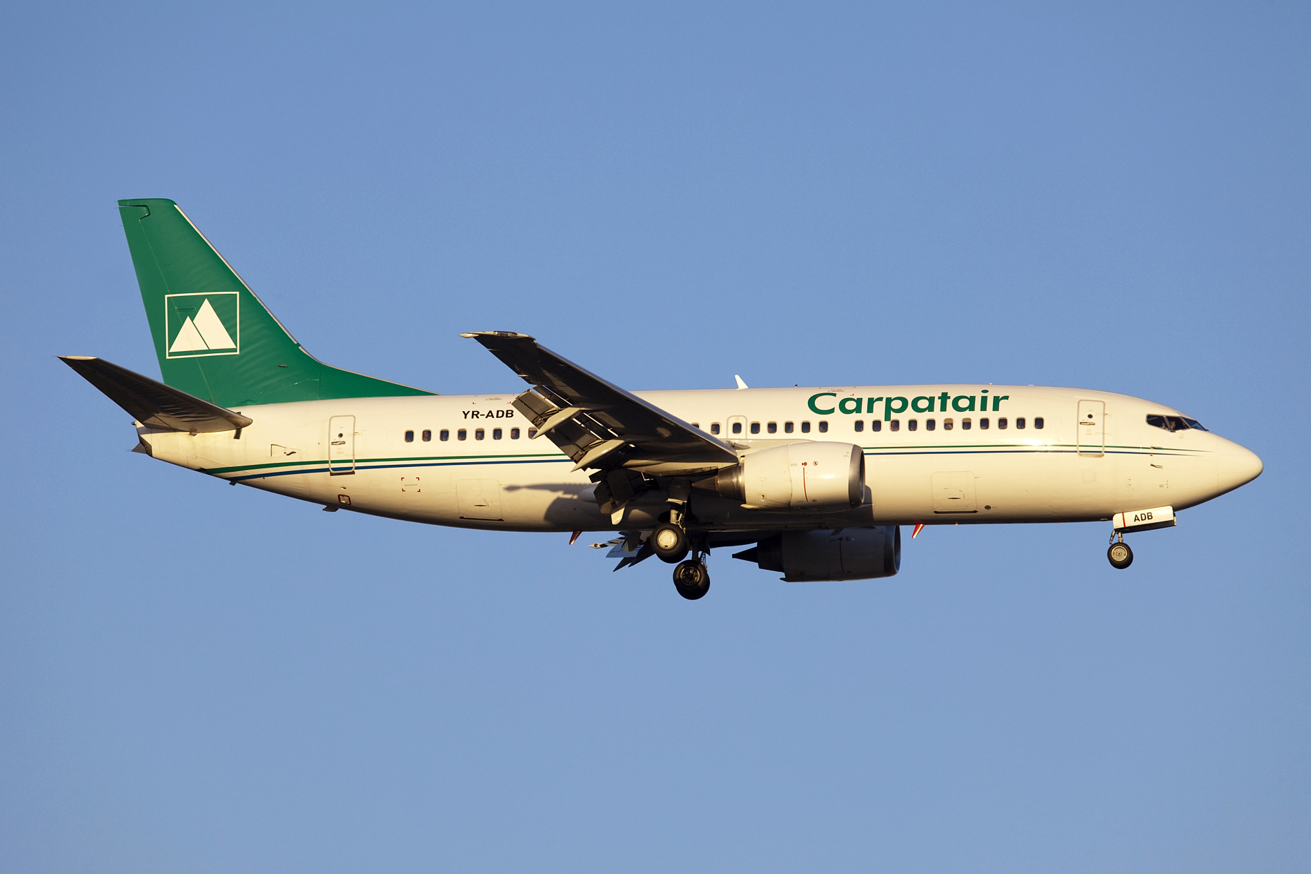 Antalya